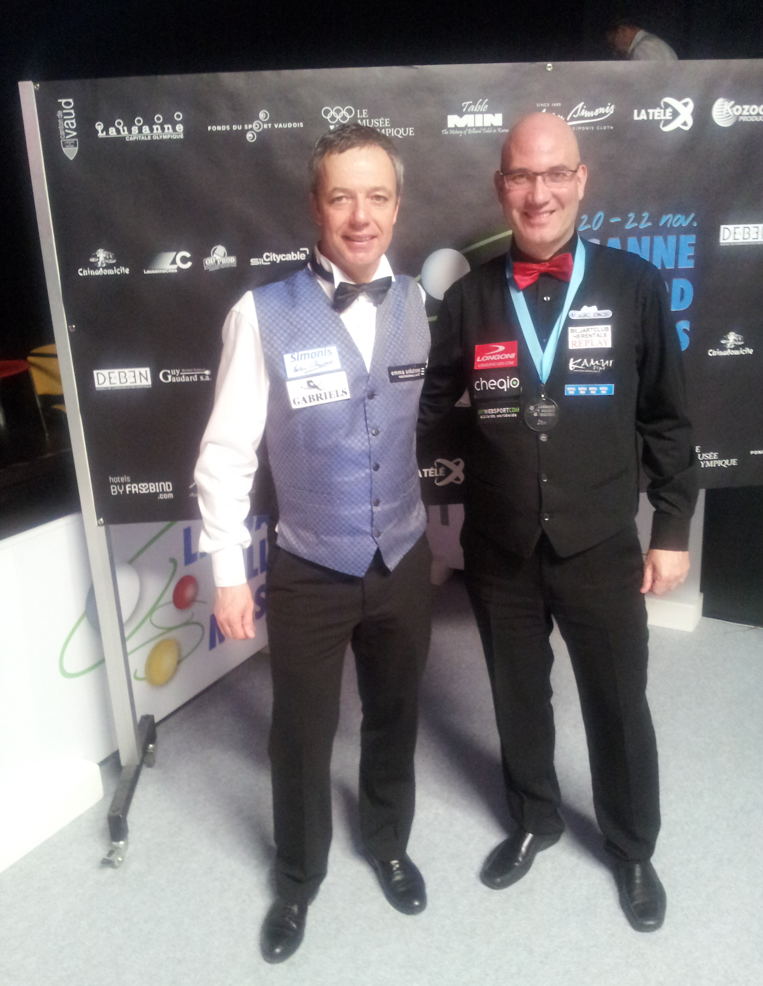 2015 Lausanne Billard Masters in Three-cushion. Venue: Casino de Montbenon, Lausanne-CHE